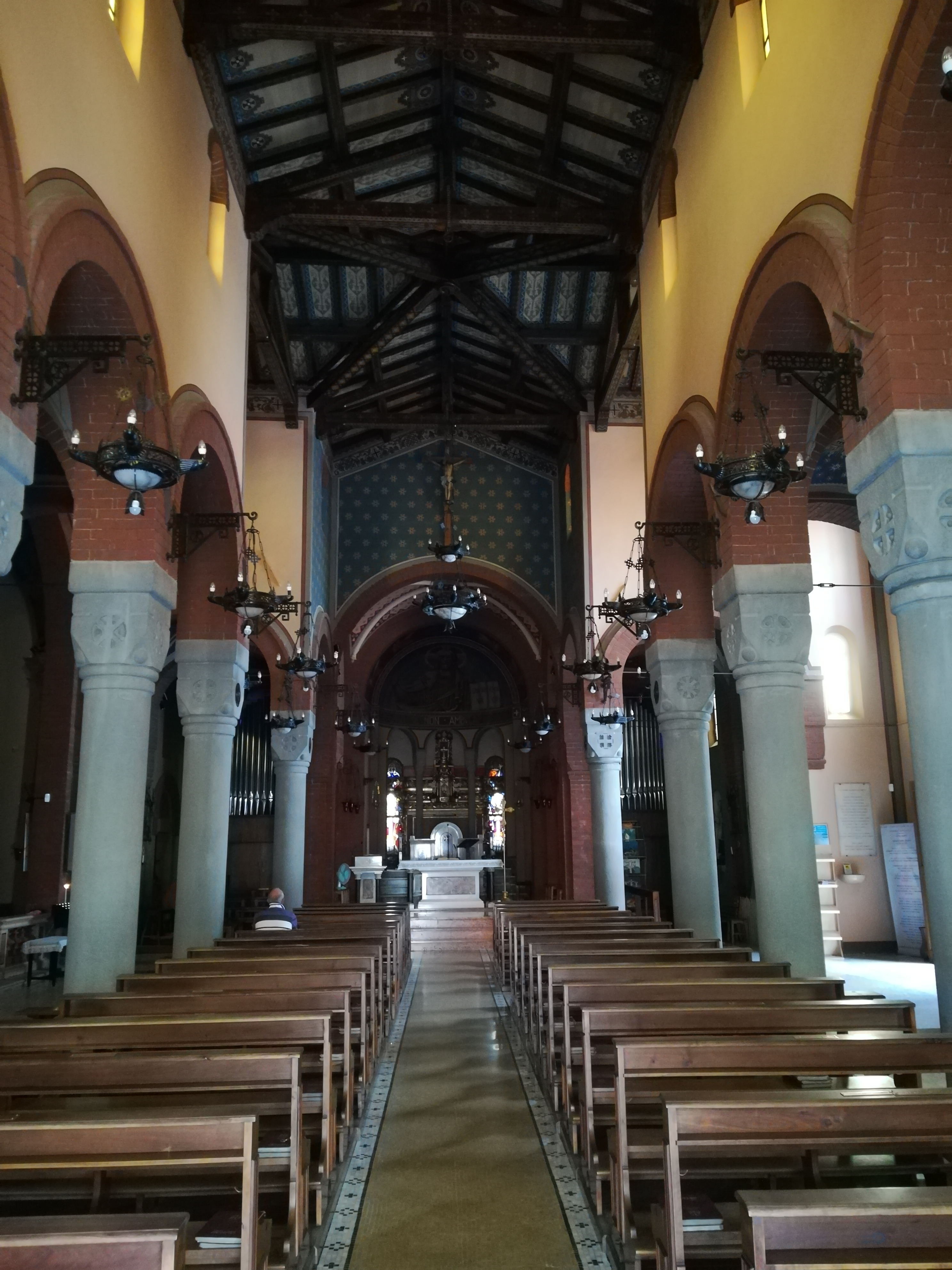 Traversetolo